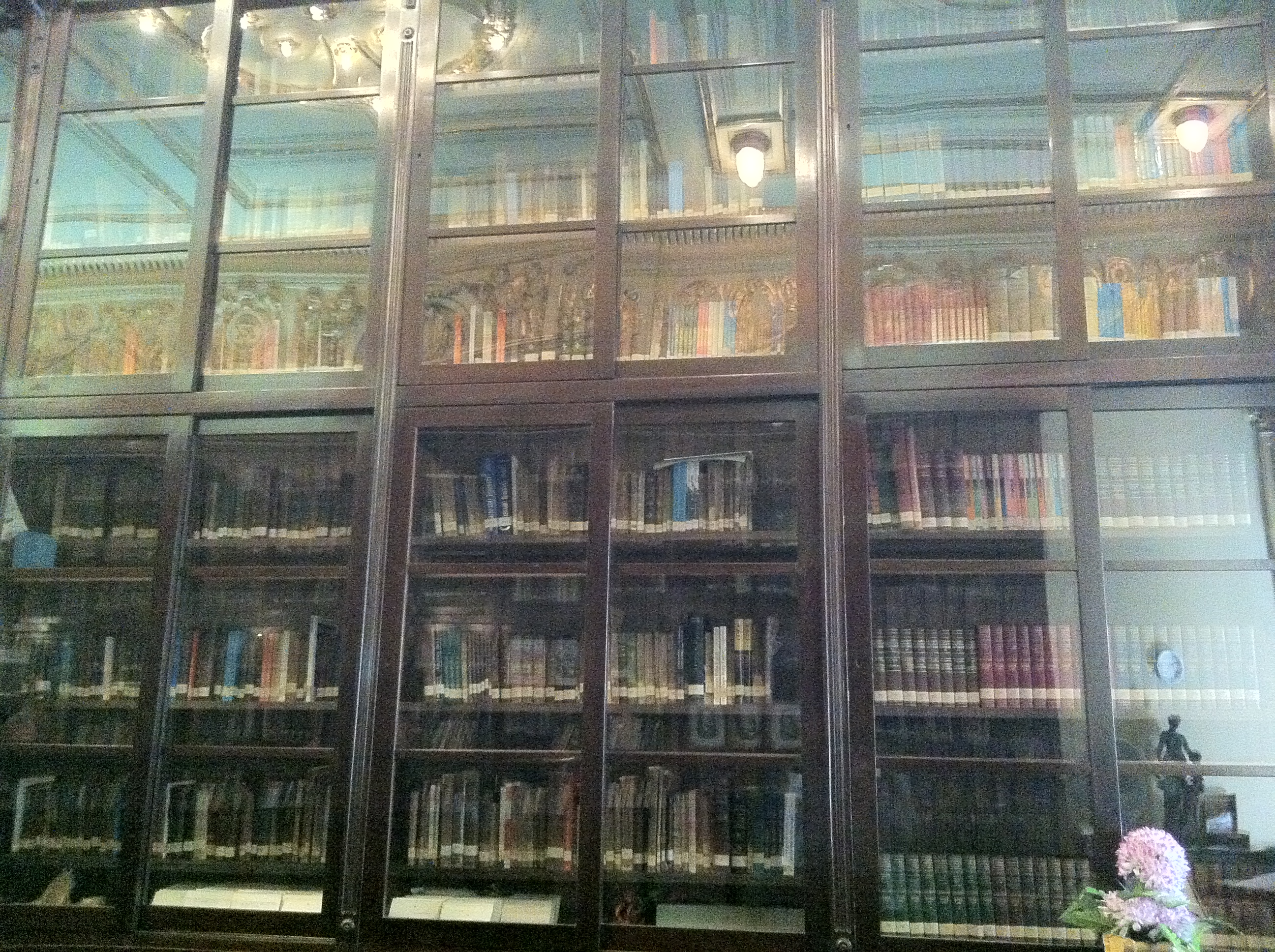 Segundo armário de livros da biblioteca do Círculo, localizado em frente às cadeiras de oração